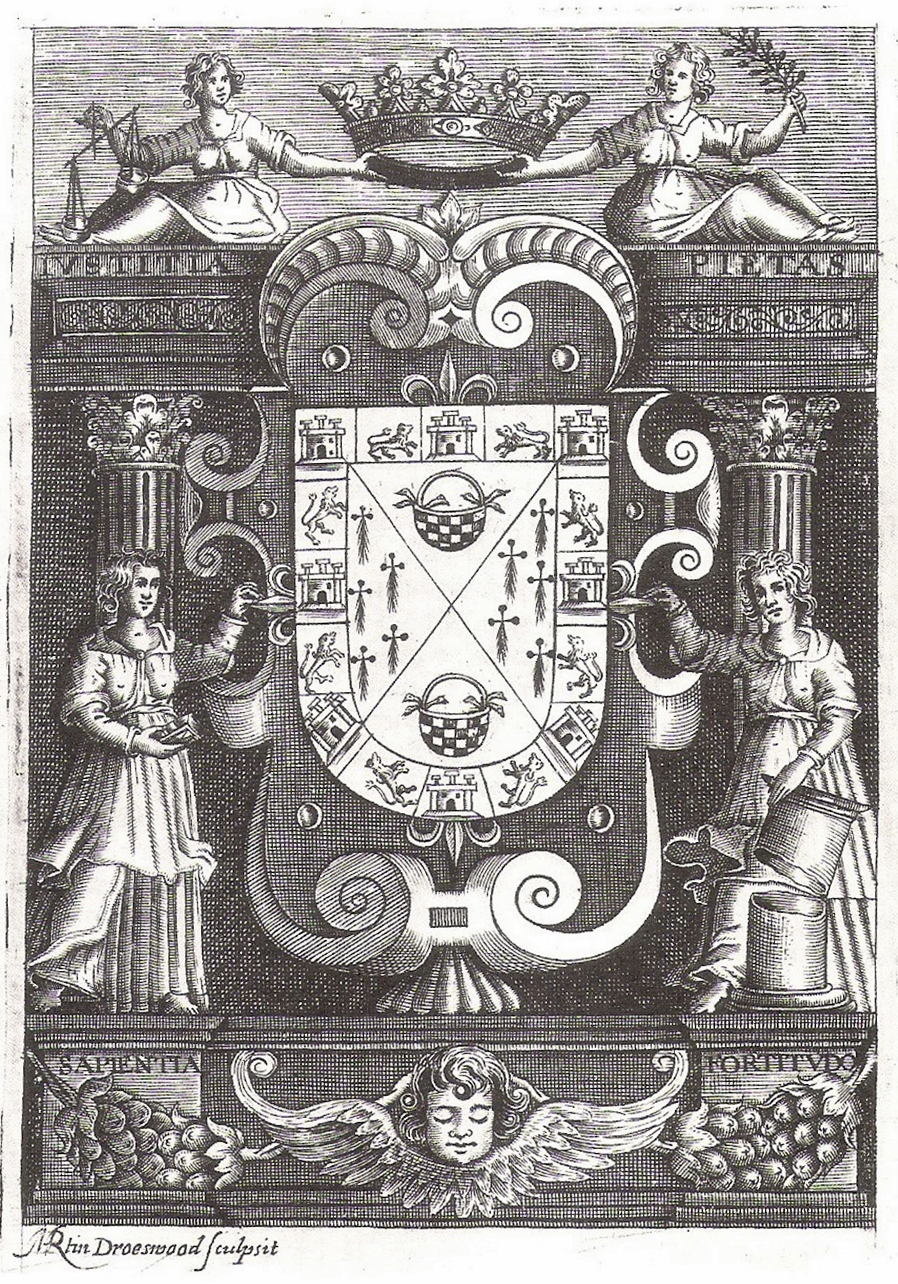 Escudo de la familia Guzmán.